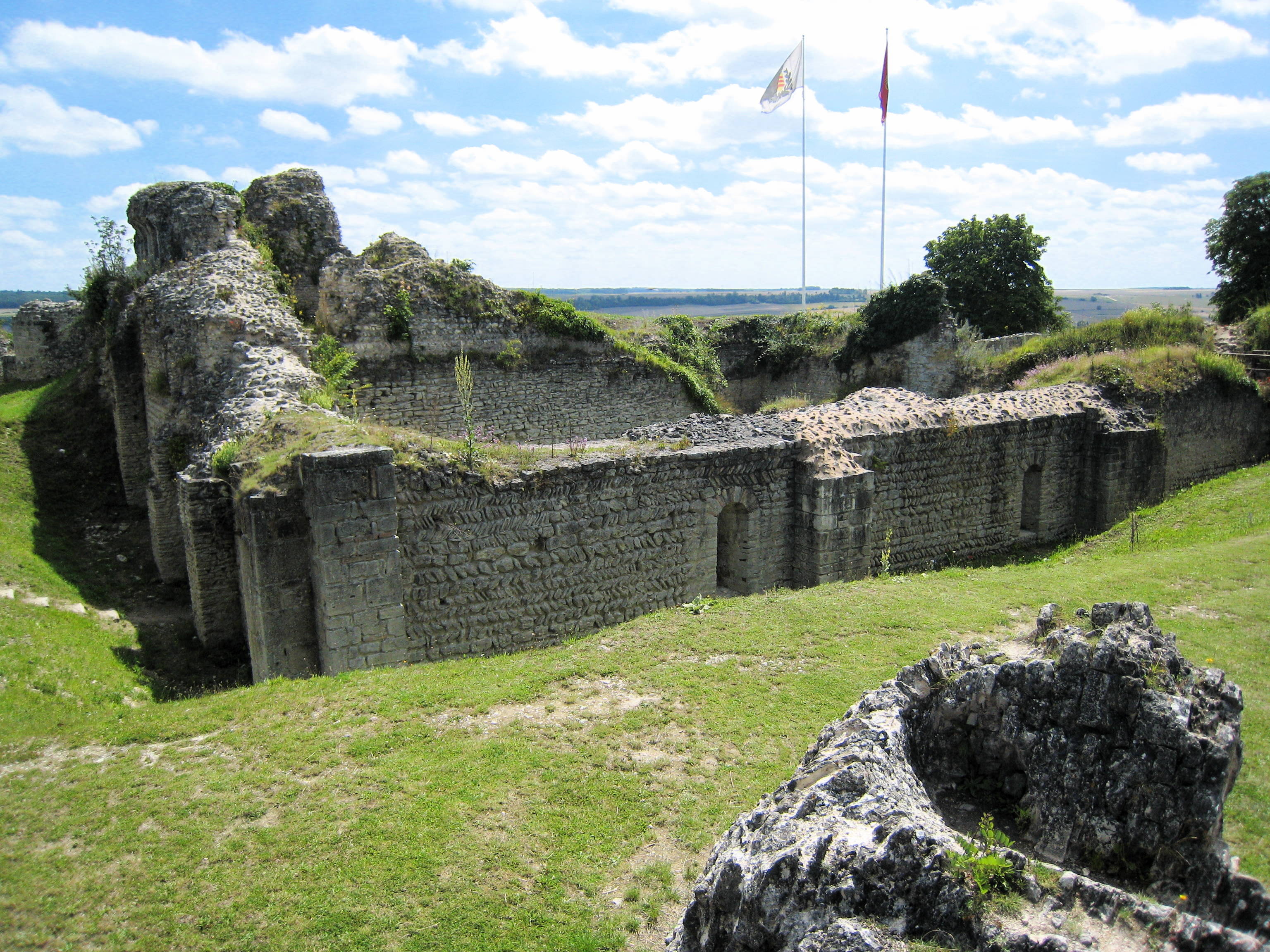 Les ruines du donjon d'Ivry la Bataille (27), France